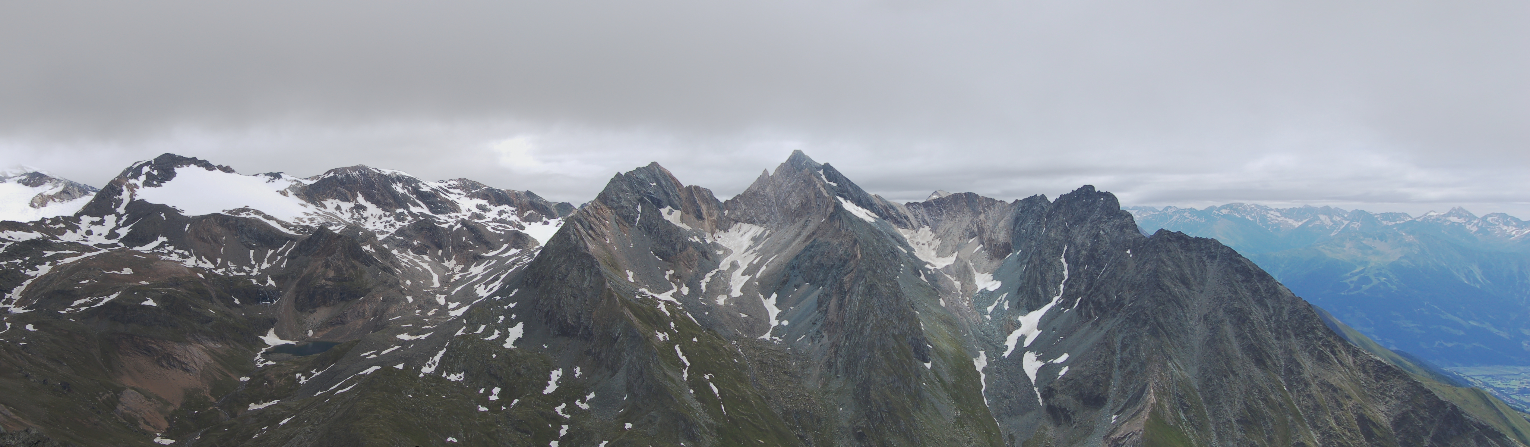 Panorama von Weißspitze bis Wunwand in der Venedigergruppe im Nationalpark Hohe Tauern, Osttirol. Gesehen von Westen. This file shows the National Park Hohe Tauern in Austria.